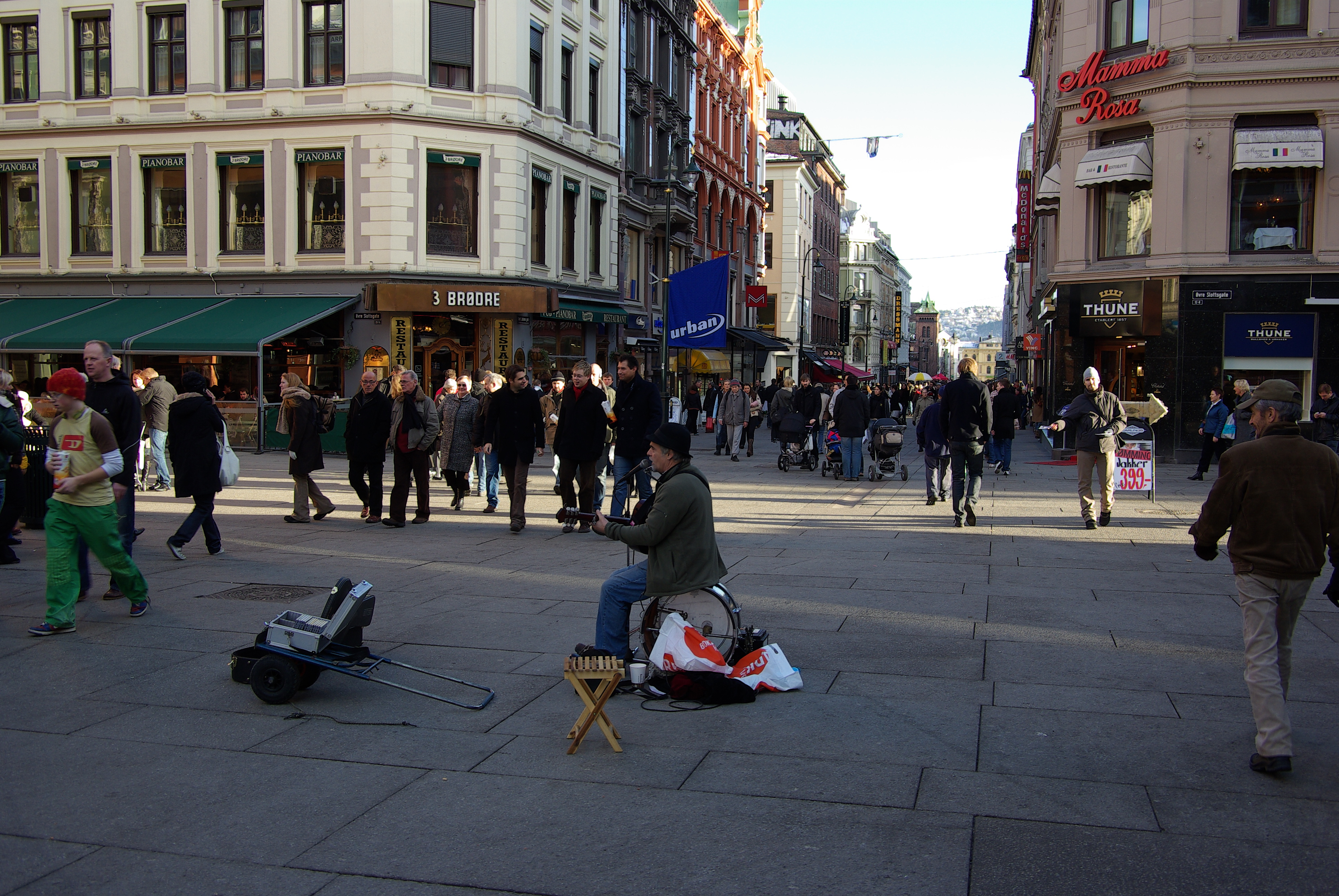 Karl Johan in Oslo, Norway